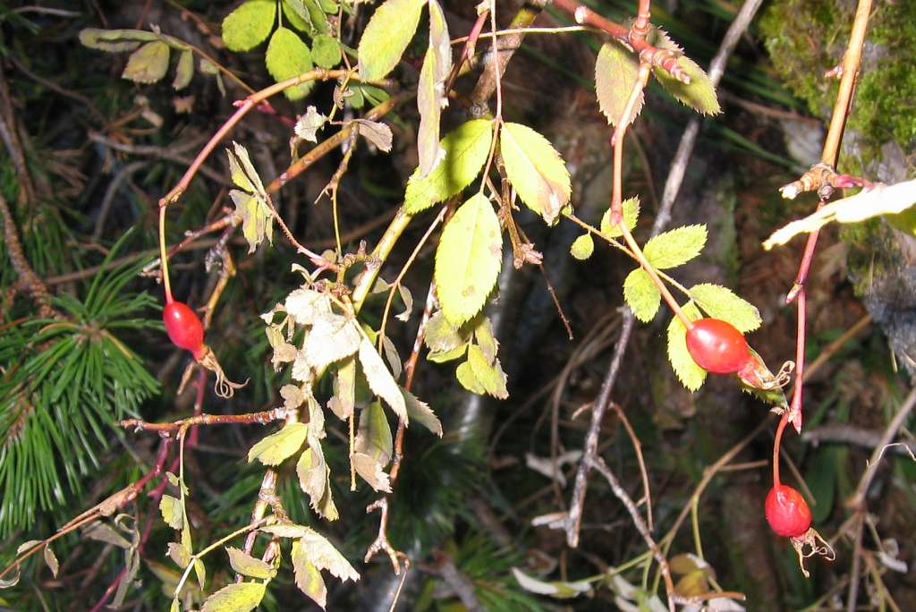 Hagebutte der Alpen-Heckenrose, Fundort: Sandling, Steiermark.